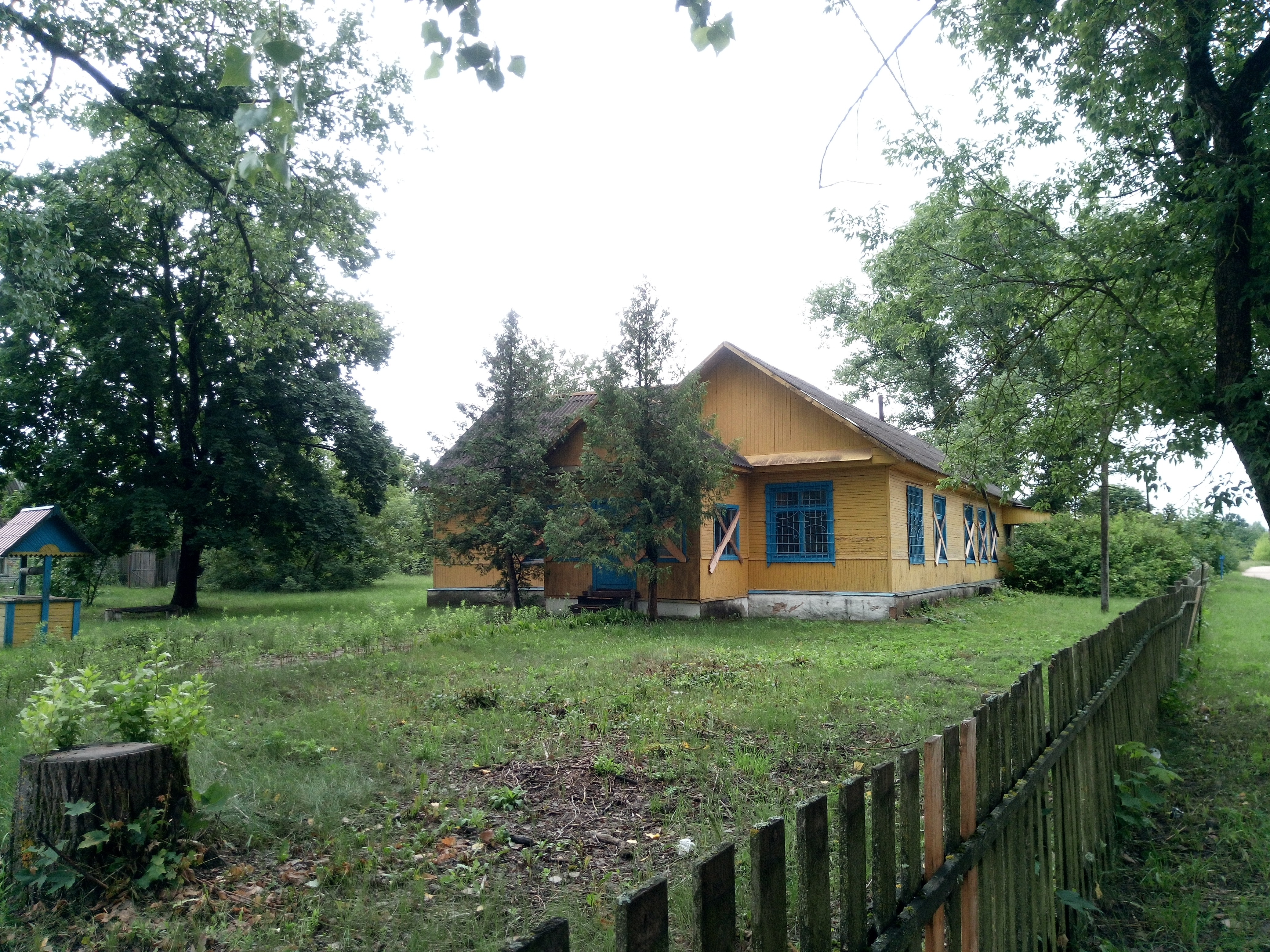 Будынак былога талькаўскага сельсавета